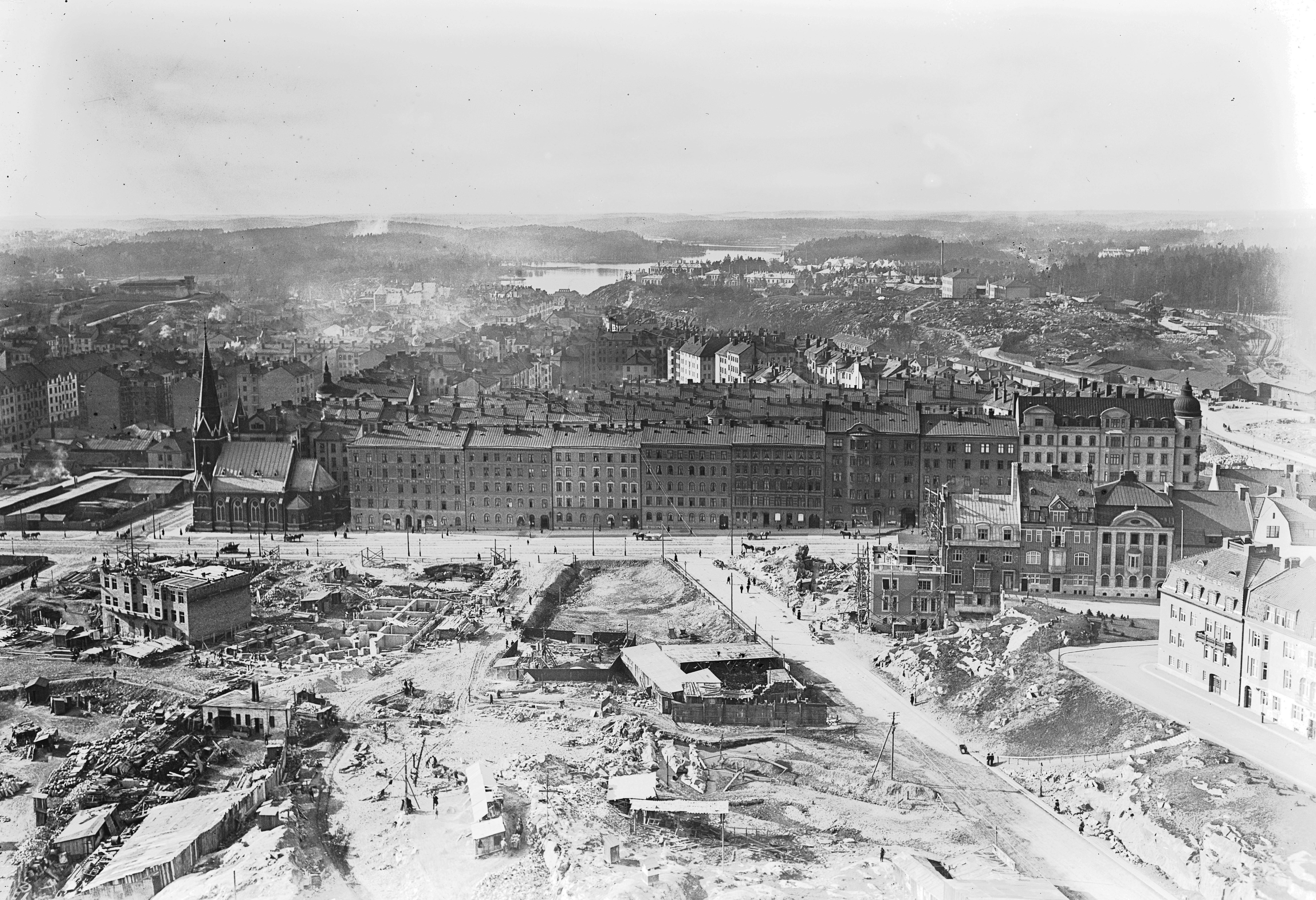 Vy mot norr taget år 1912 från Engelbrektskyrkans torn. Tyrgatans husrad till höger är färdigbyggd samt syns till höger en del av Friggagatans husrad som även den är färdigbyggd. Den vågräta gatan som syns i bakgrunden är Odengatan och kyrkan som syns är Sankt Georgios kyrka.